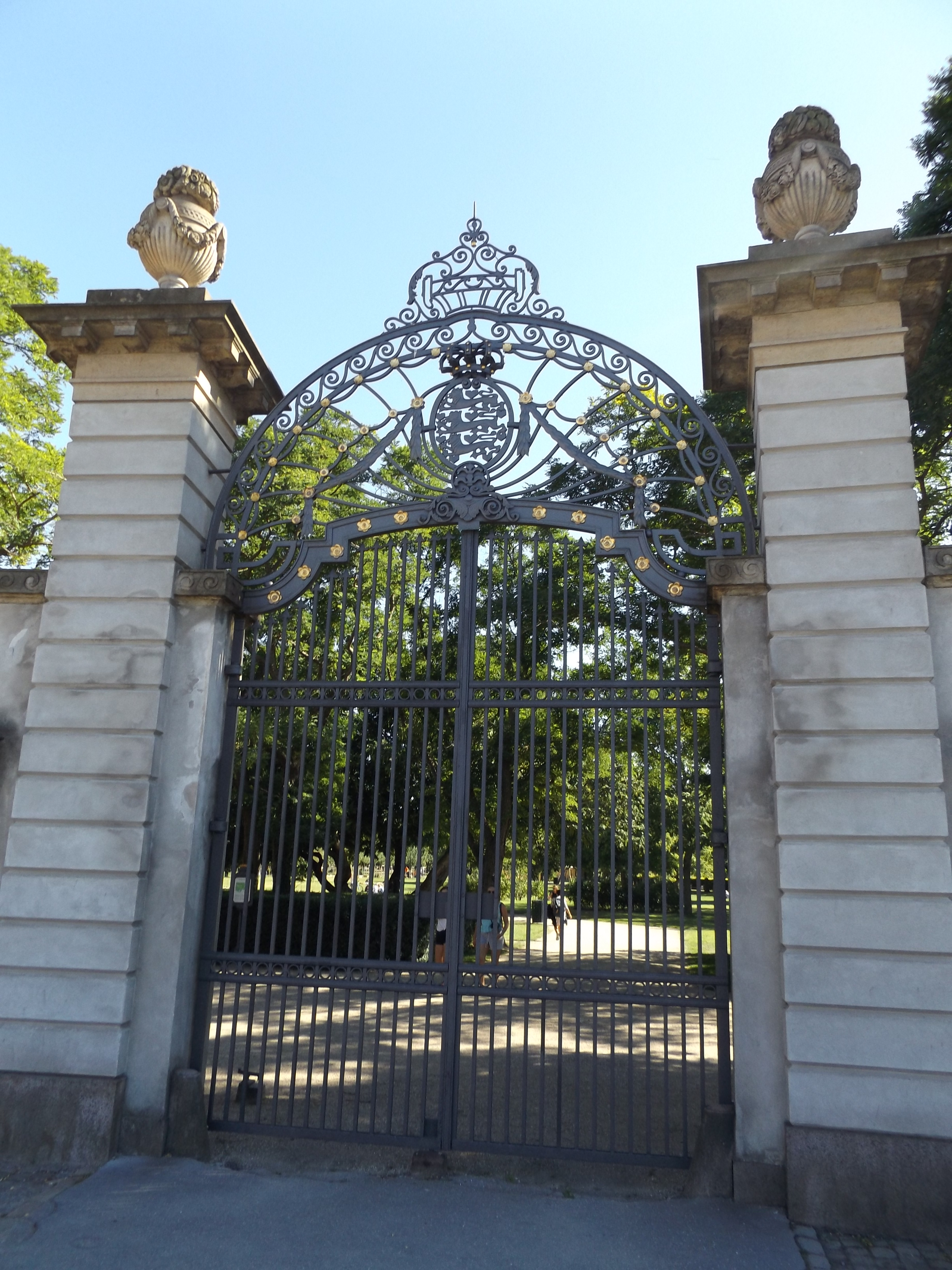 The gate to Kongens Have at the corner of Øster Voldgade and Sølvgade in Copenhagen, Denmark